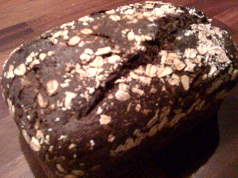 Kavring.